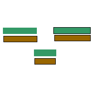 * Date : 25 juin 2004 Source : dessin personnelle d'Archeos Description : Schéma de Tutulus, type d'entrée de camp romain Les bandes marron représentent les fossés Les bandes vertes représentent le talus formé de la jetée des fossés Il n'y a pas de porte à proprement parler, simplement une ouverture dans le rempart provisoire Licence